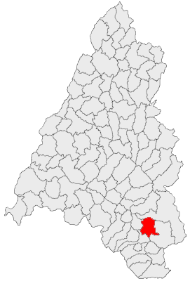 Categorie:Hărţi ale judeţului Bihor